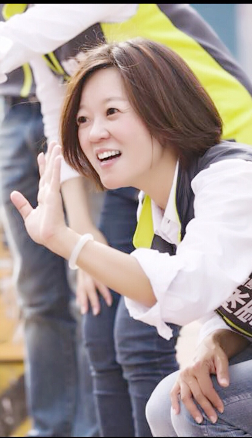 中文（台灣）: 新竹市香山區議員候選人陳雪慧，會幫你